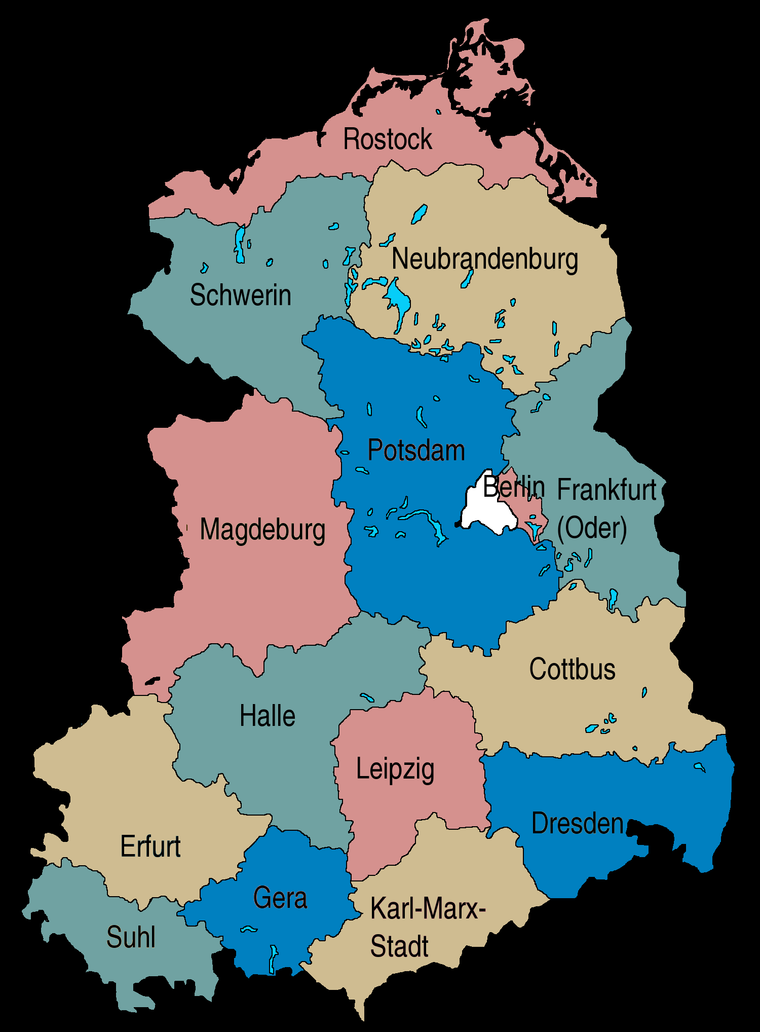 Bildbeschreibung: Bezirke der DDR Redakteur: Hans G. Oberlack Datum: 15.4.06 Sonstiges: Überarbeitung der Bezeichnungen der Bezirke Suhl, Erfurt und Gera. Einfügen einer vierten Farbe, um Farbgleichheiten an Grenzen zu vermeiden. Freigabe: Ticket#: 2006052910009533